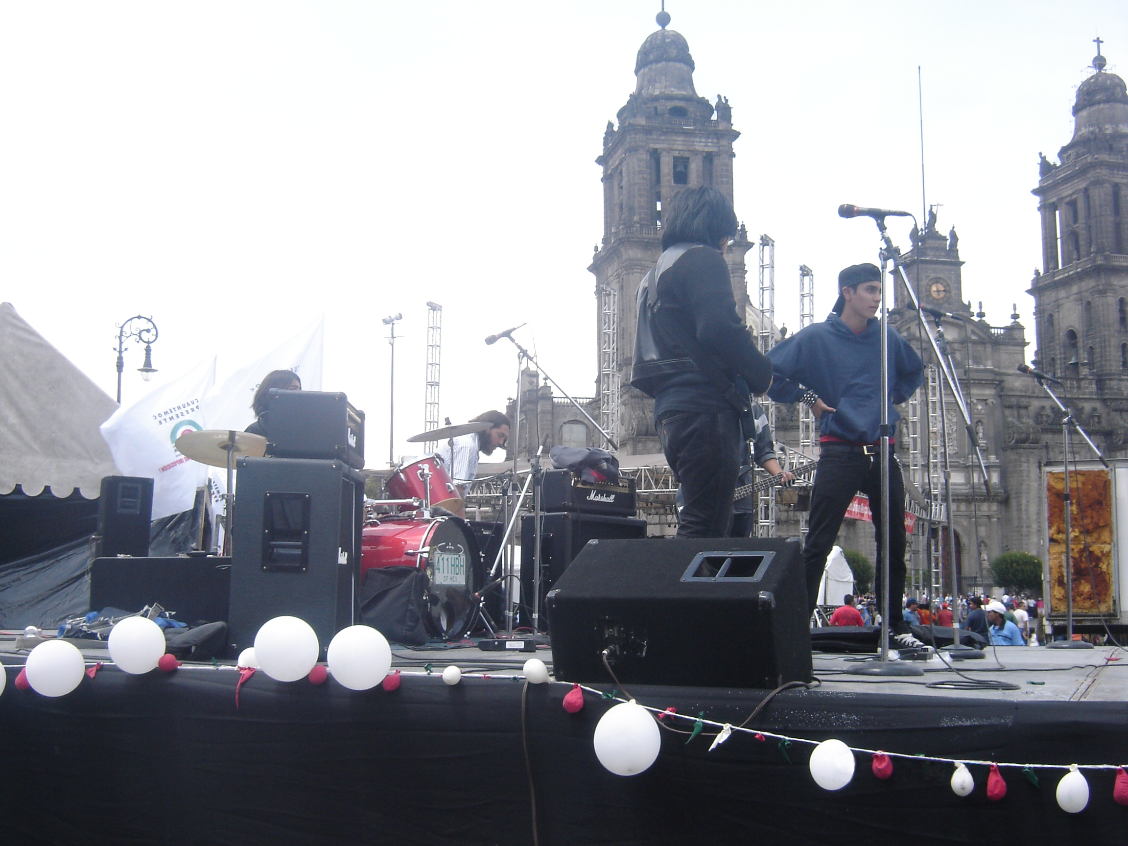 Blind Horses en el Zocalo